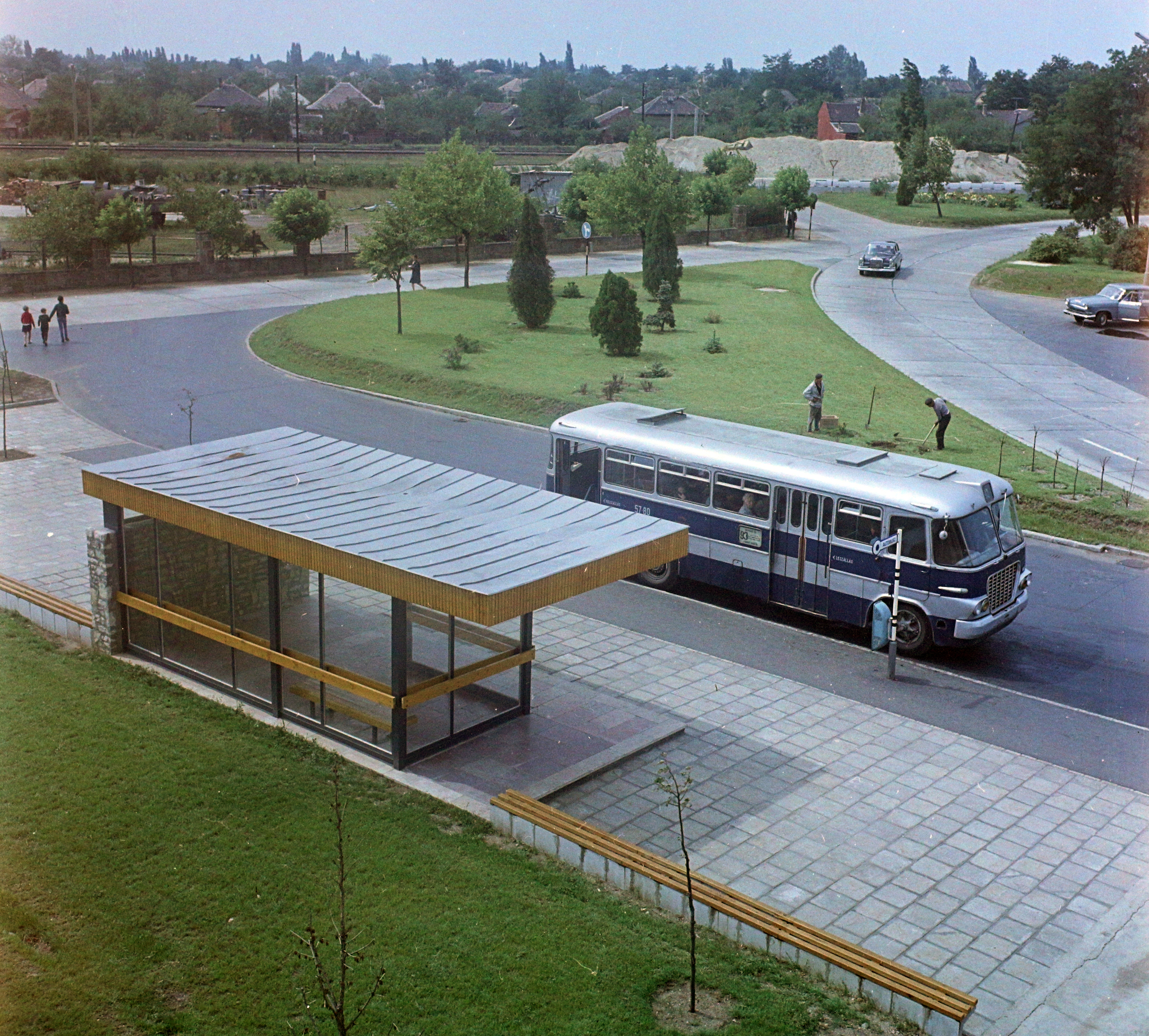 a repülőtéri buszjárat megállója a főbejárat mellett. Location: Hungary, Budapest XVIII. Tags: colorful, airport, bus stop, bus, Ikarus-brand, Budapest Title: a repülőtéri buszjárat megállója a főbejárat mellett.